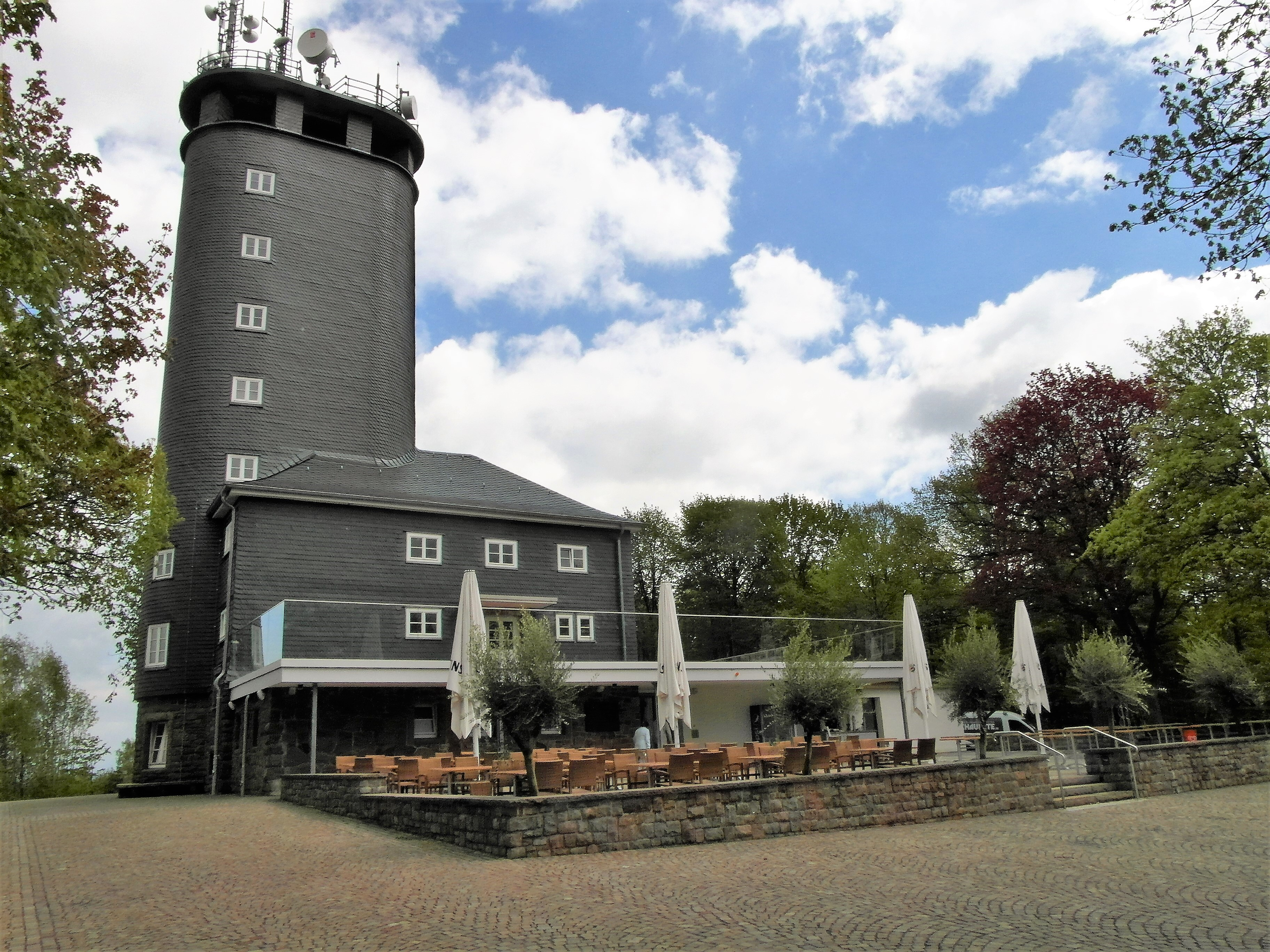 Aussichtsturm Hohe Bracht (nahe Altenhundem) nach Renovierung 2018